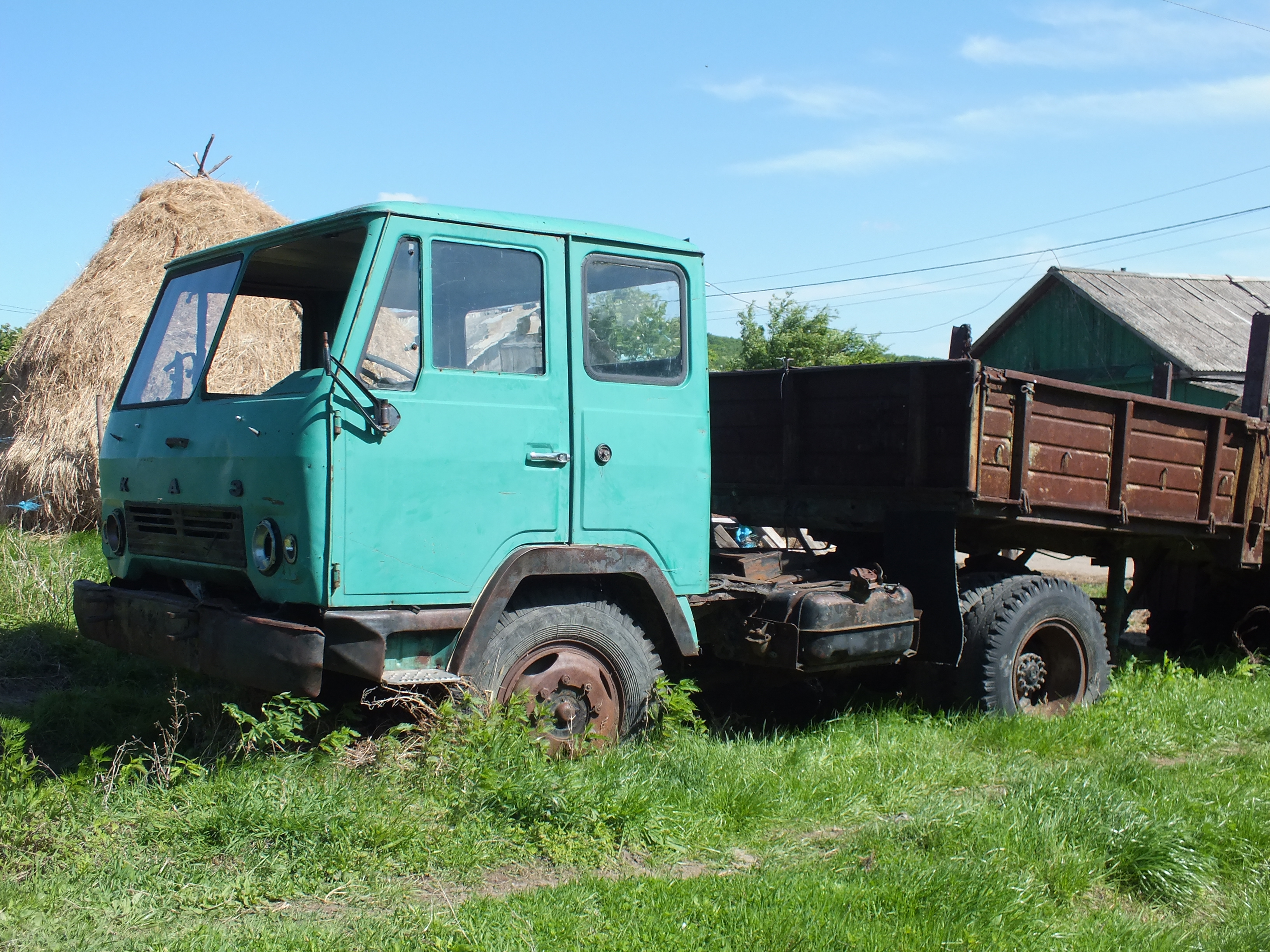 КАЗ-608В Хабаровский край